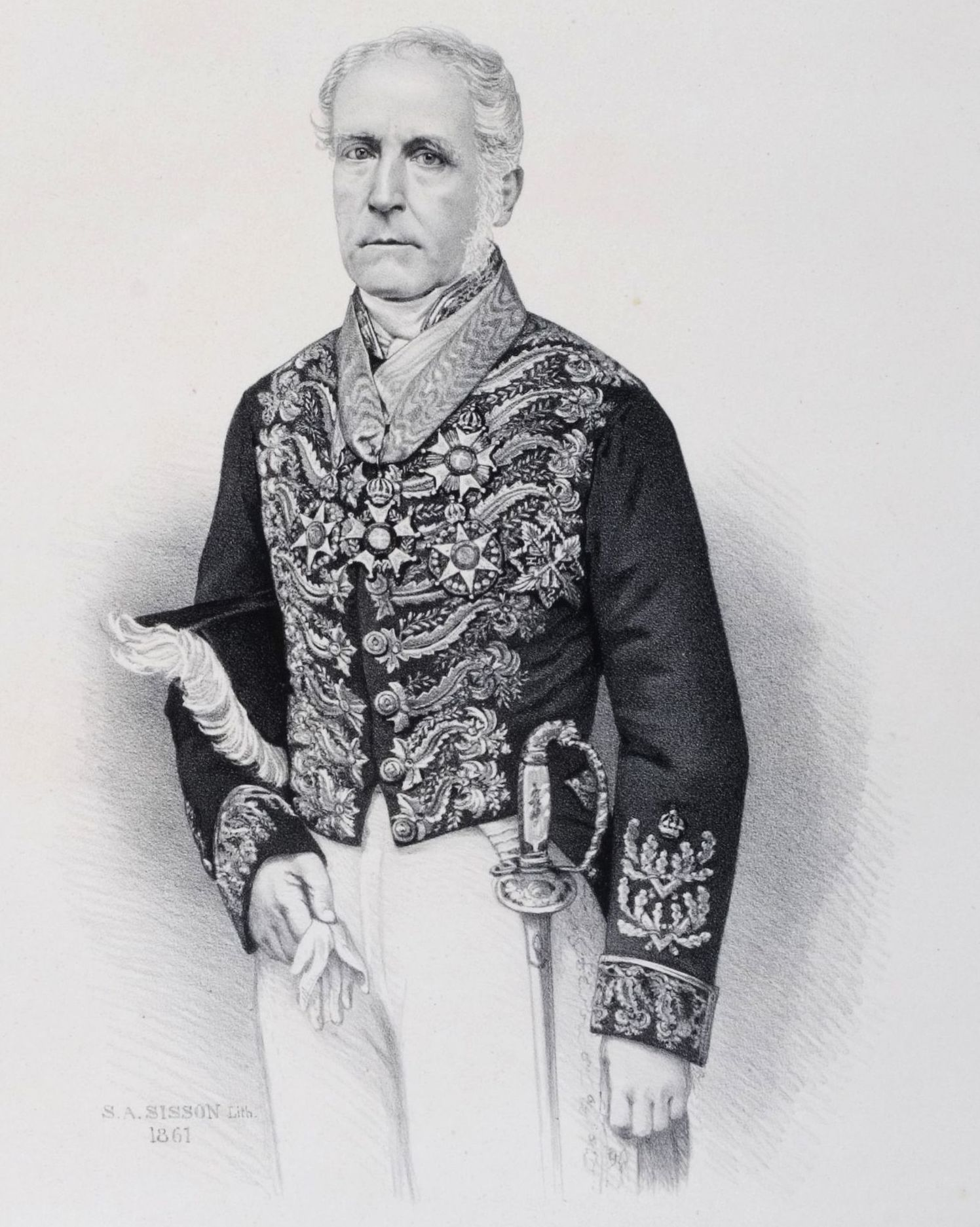 Litografia em preto e branco